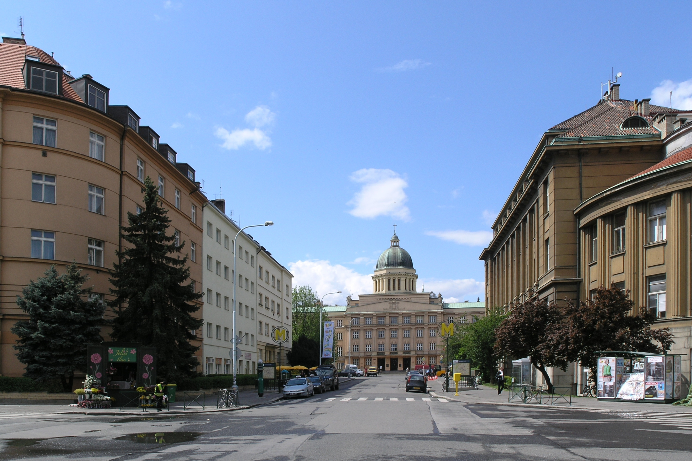 Praha, Dejvice - ulice Zikova od křižovatky se Studentskou (natáčení filmu G.I. Joe alias Dark Sky)